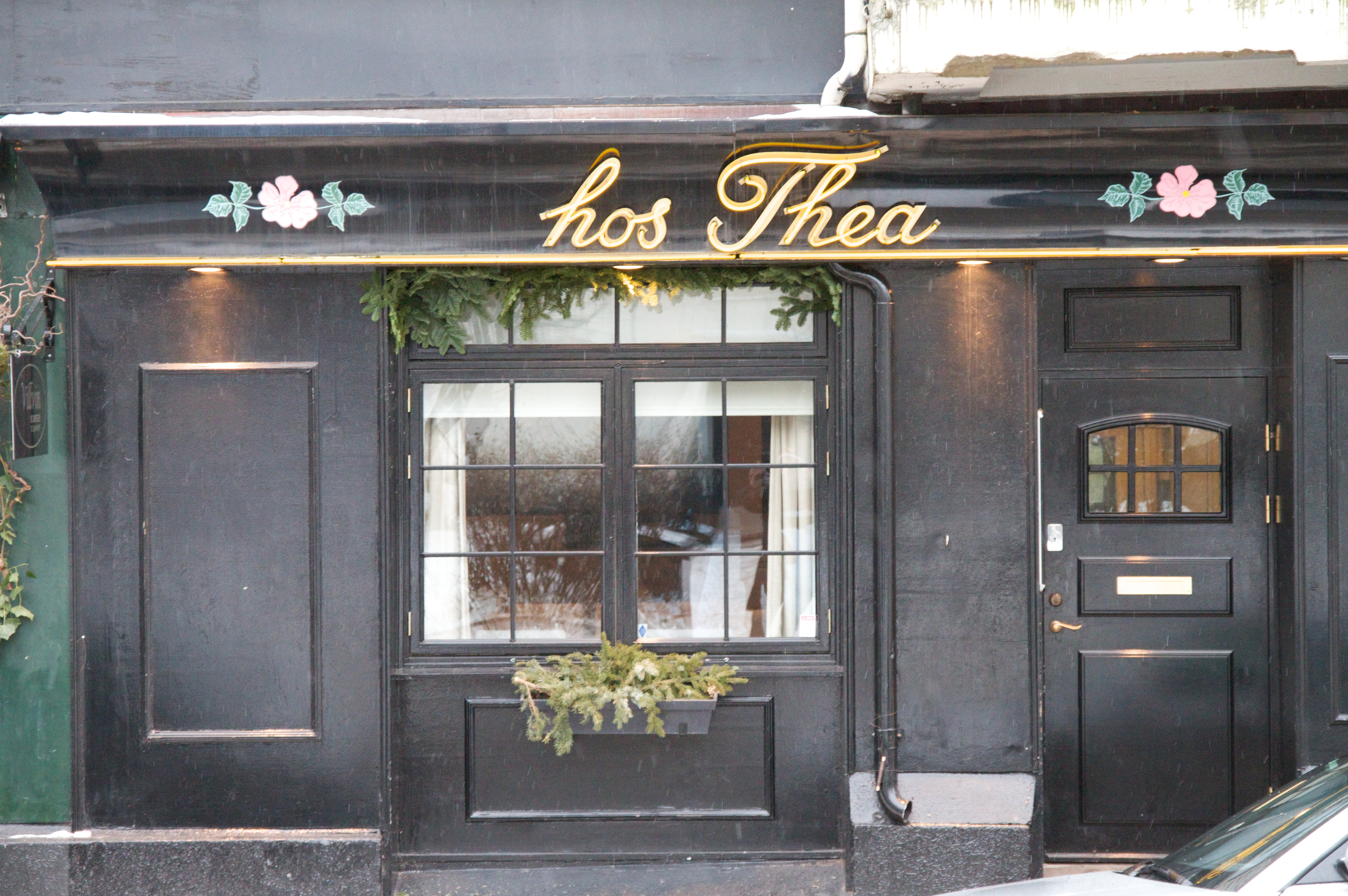 Hos Thea i Drammensveien på Skillebekk i Oslo.